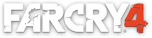 Logo von Far Cry 4